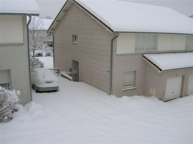 Une des rues du quartier des Tilleroyes lors des fortes chutes de neige du 5 mars 2006.